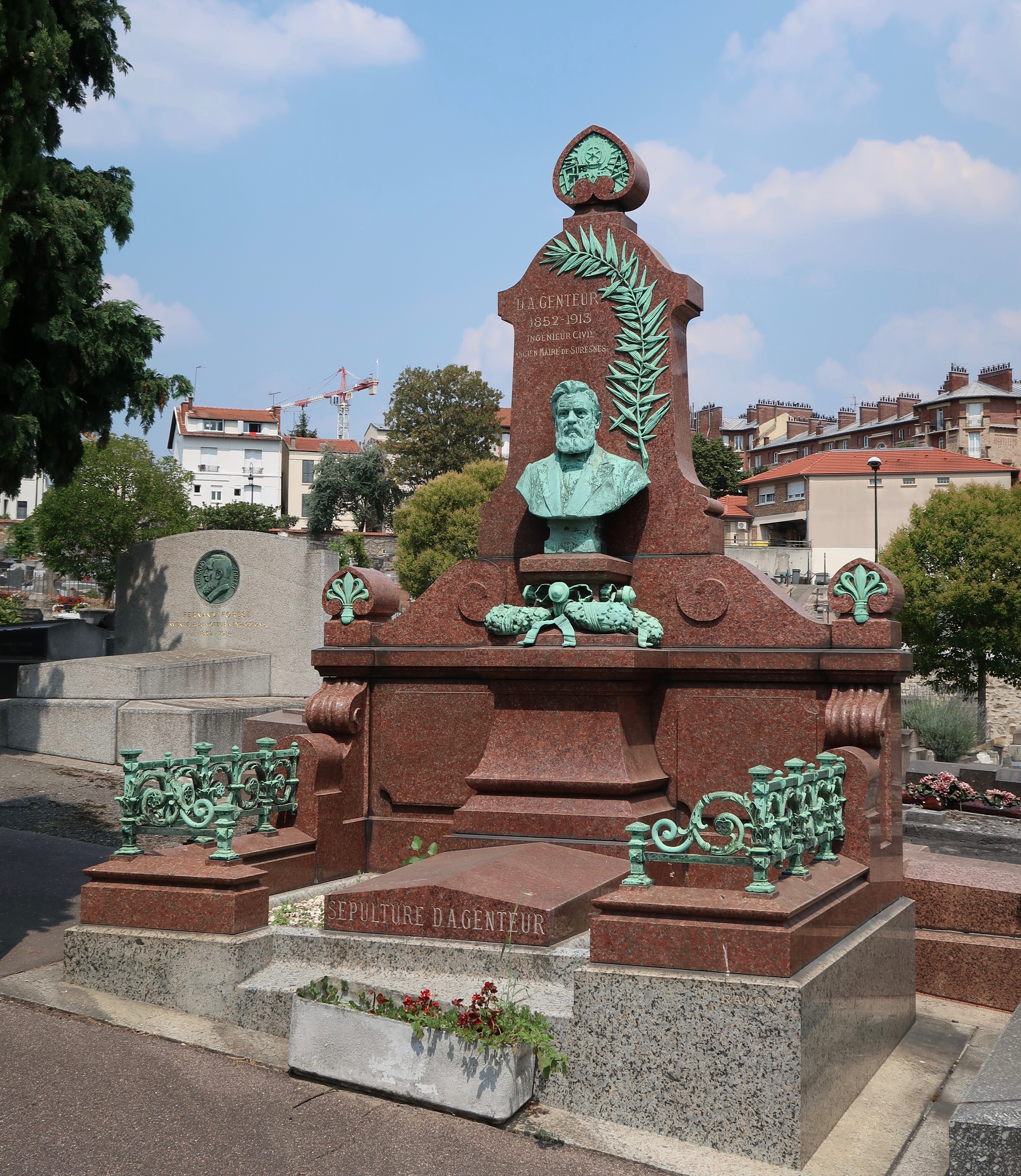 Tombe de l'ancien maire Arthème Gentheur (1852-1913) dans le cimetière Voltaire (division 2, allée centrale) à Suresnes (Hauts-de-Seine). Buste réalisé par Auguste Maillard.